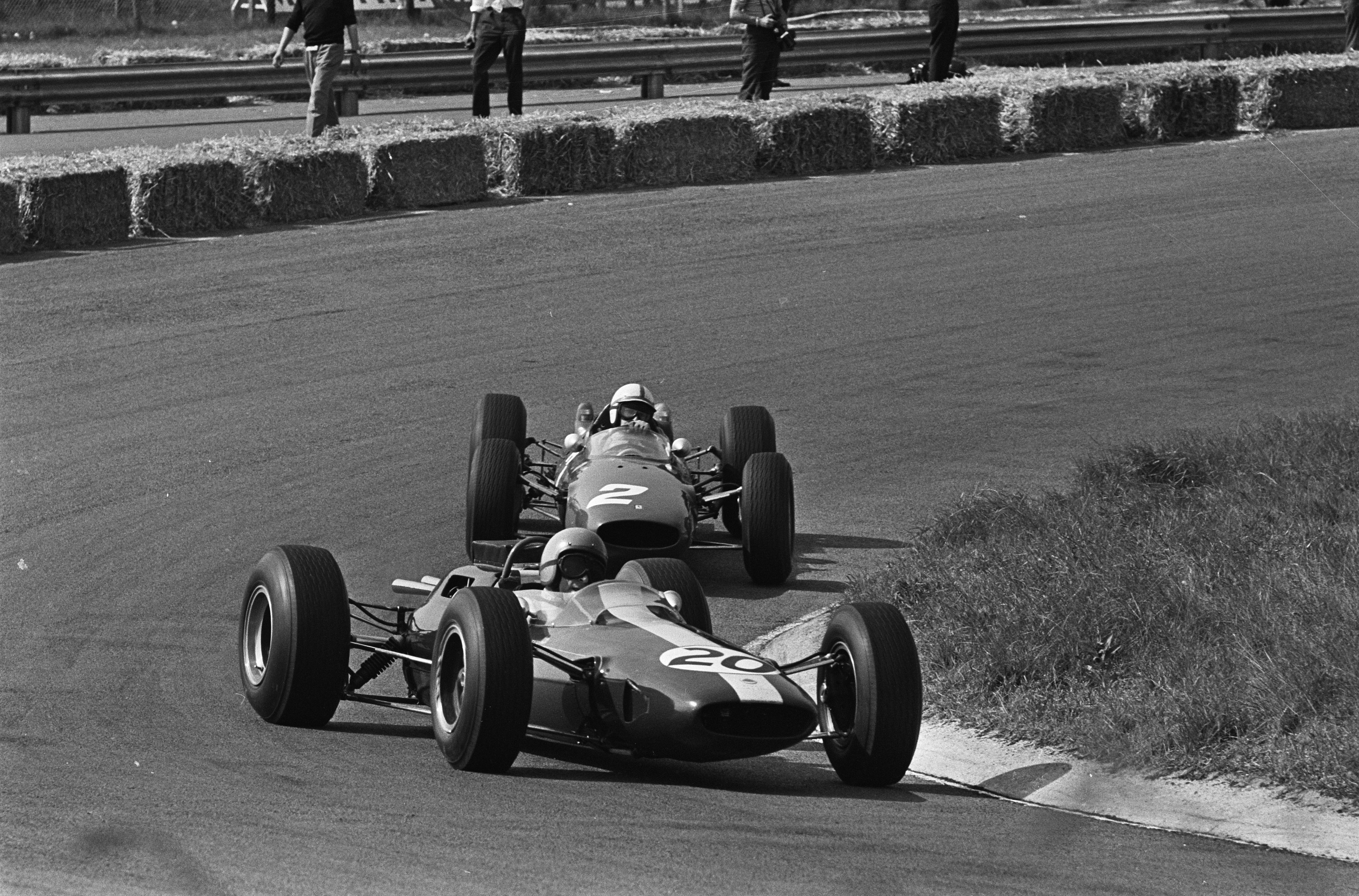 Grand Prix van Nederland, het rennersveld Jim Clark.